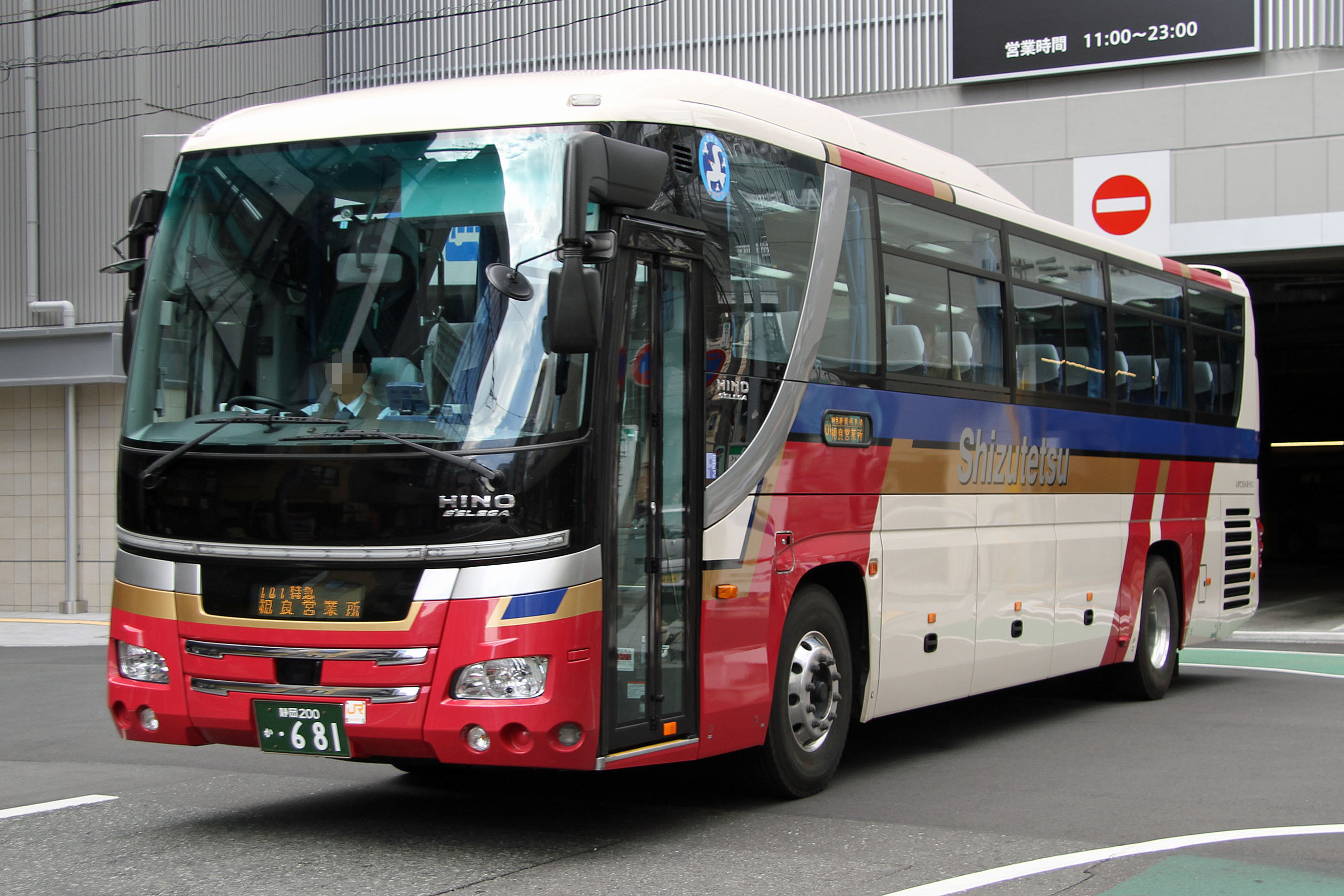 Shizutetsu Justline Car しずてつジャストラインの車両